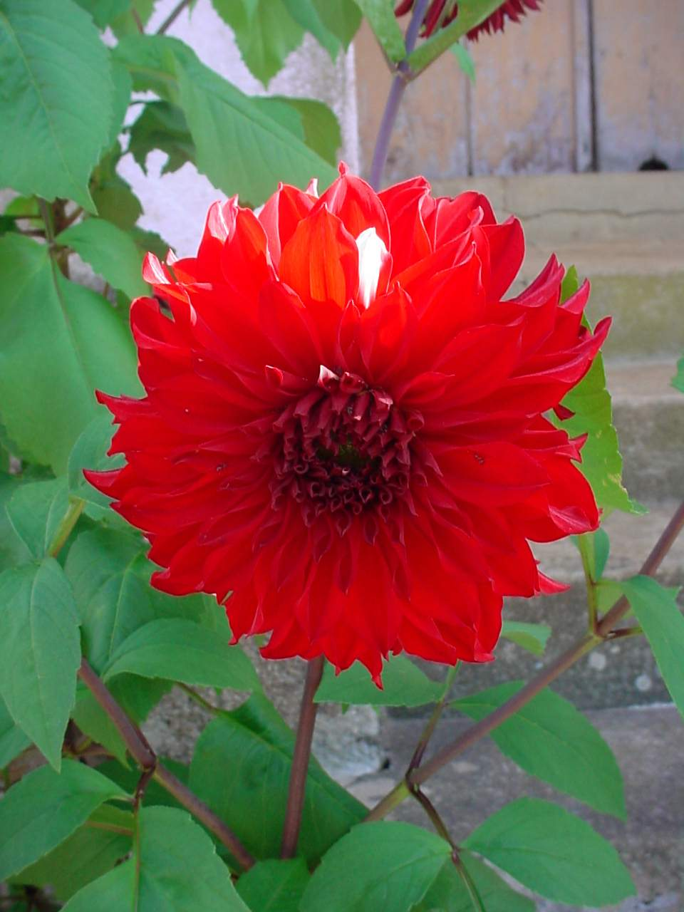 Dália Descrição Flor de Dália Fonte Fotografada pelo colaborador